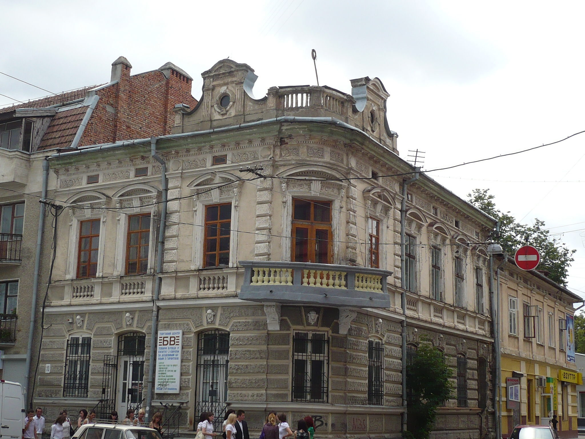 Kamienica w Iwano-Frankiwsku